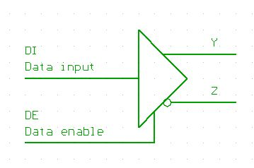 differentieller Transmitter mit enable